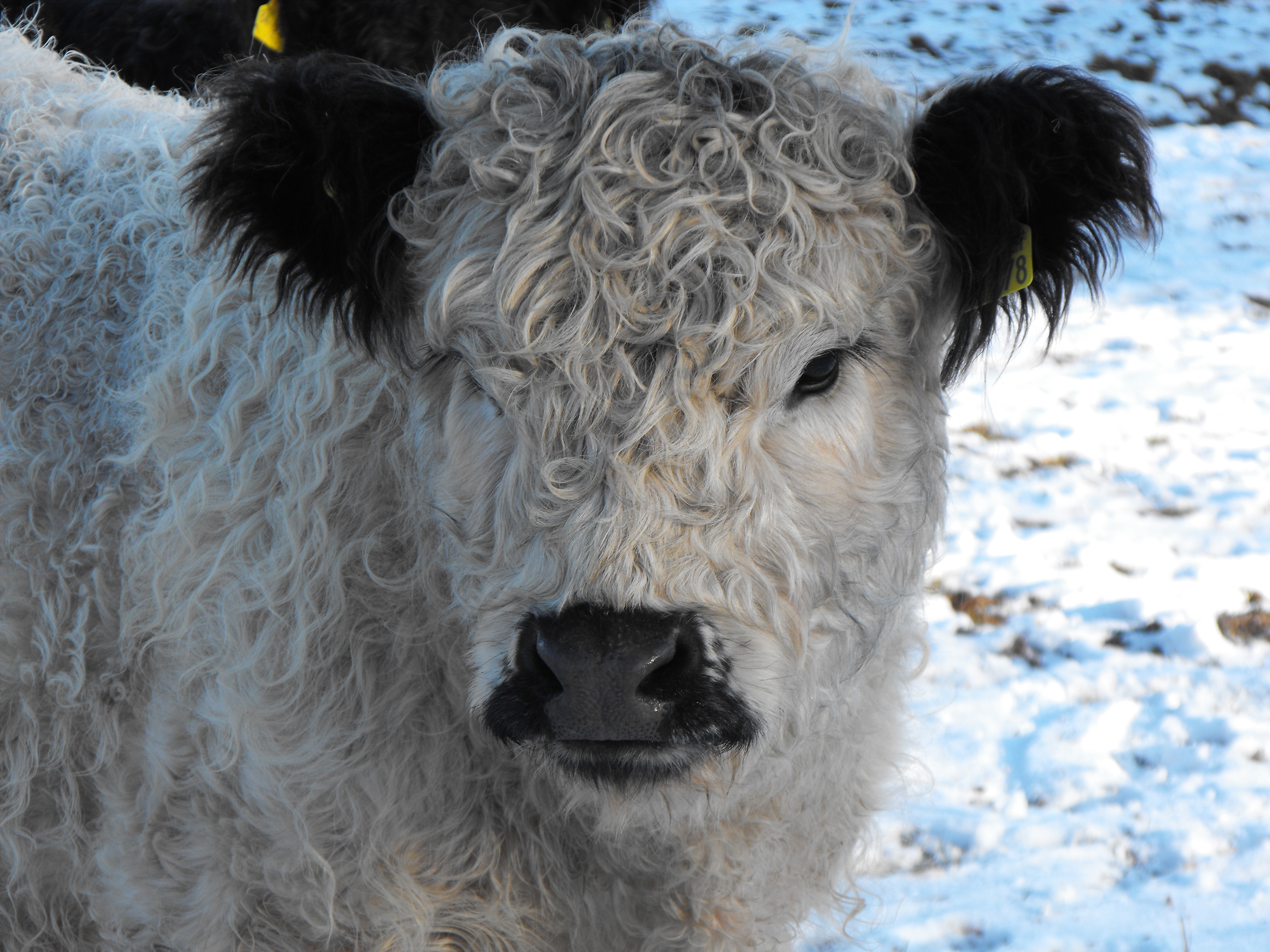 White Galloway "Penelope"